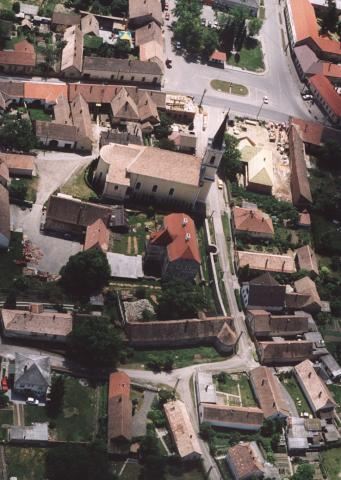 Szászvár, Hungary, aerialphotography